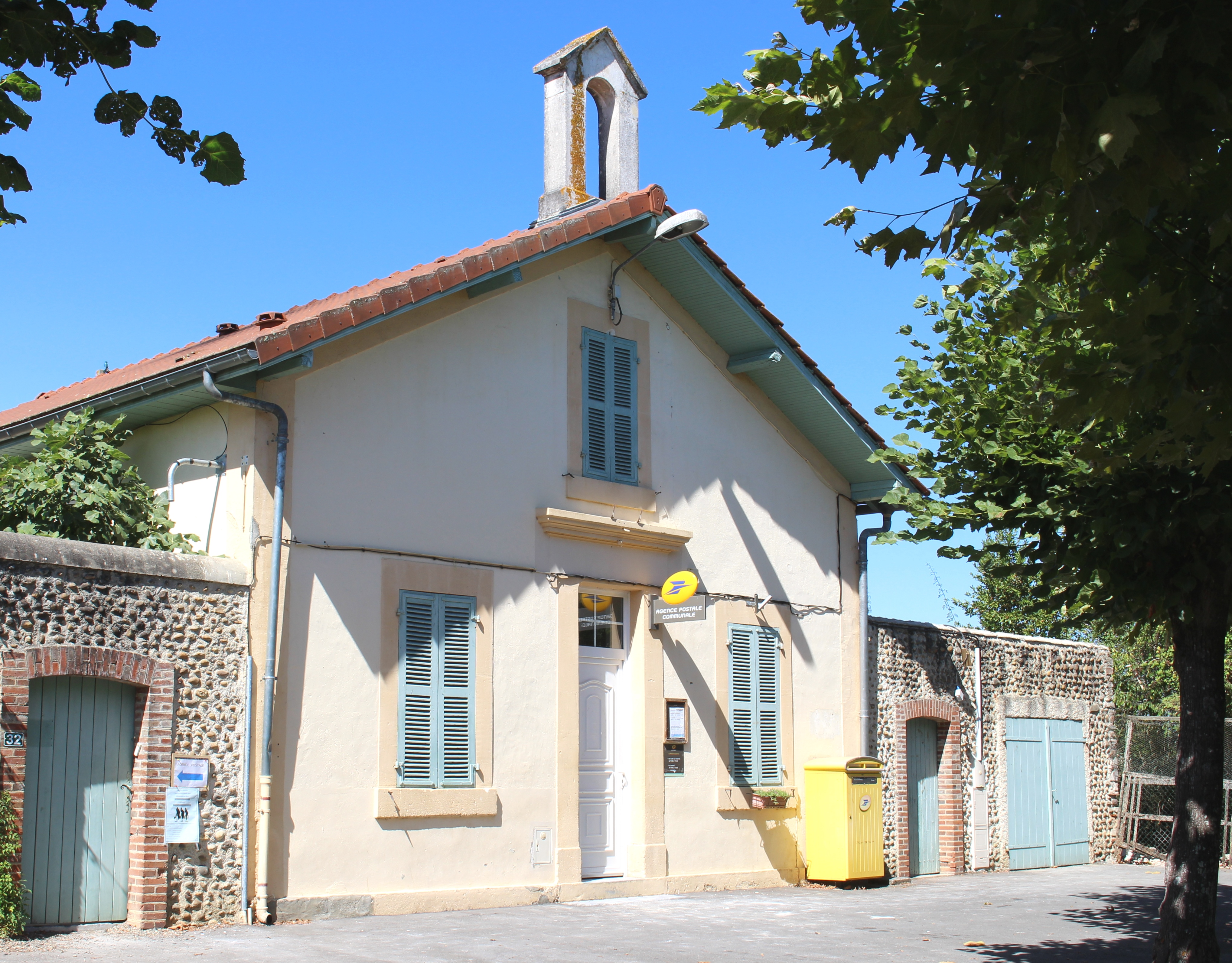 Poste de Lahitte-Toupière (Hautes-Pyrénées)